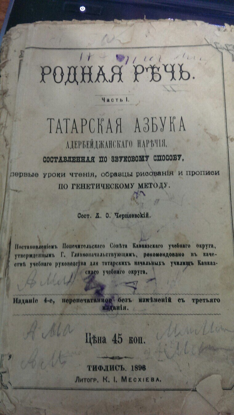 Родная речь. Татарская азбука азербайджанского наречия, составленная по звуковому способу, первые уроки чтения, образцы рисования и прописи по генетическому методу.